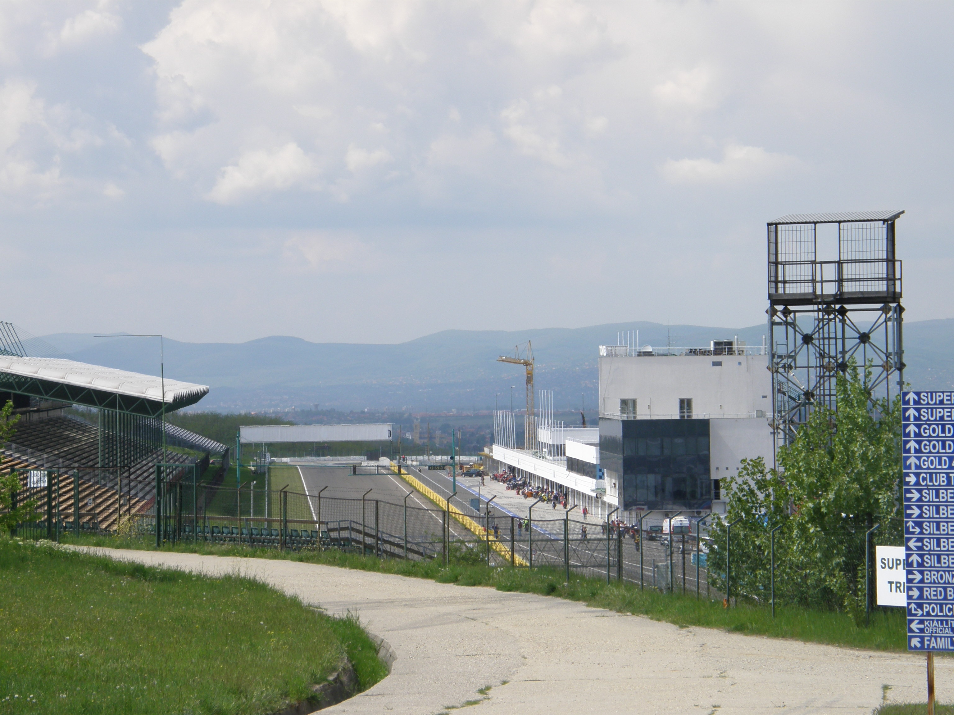 Hungaroring - pit lane